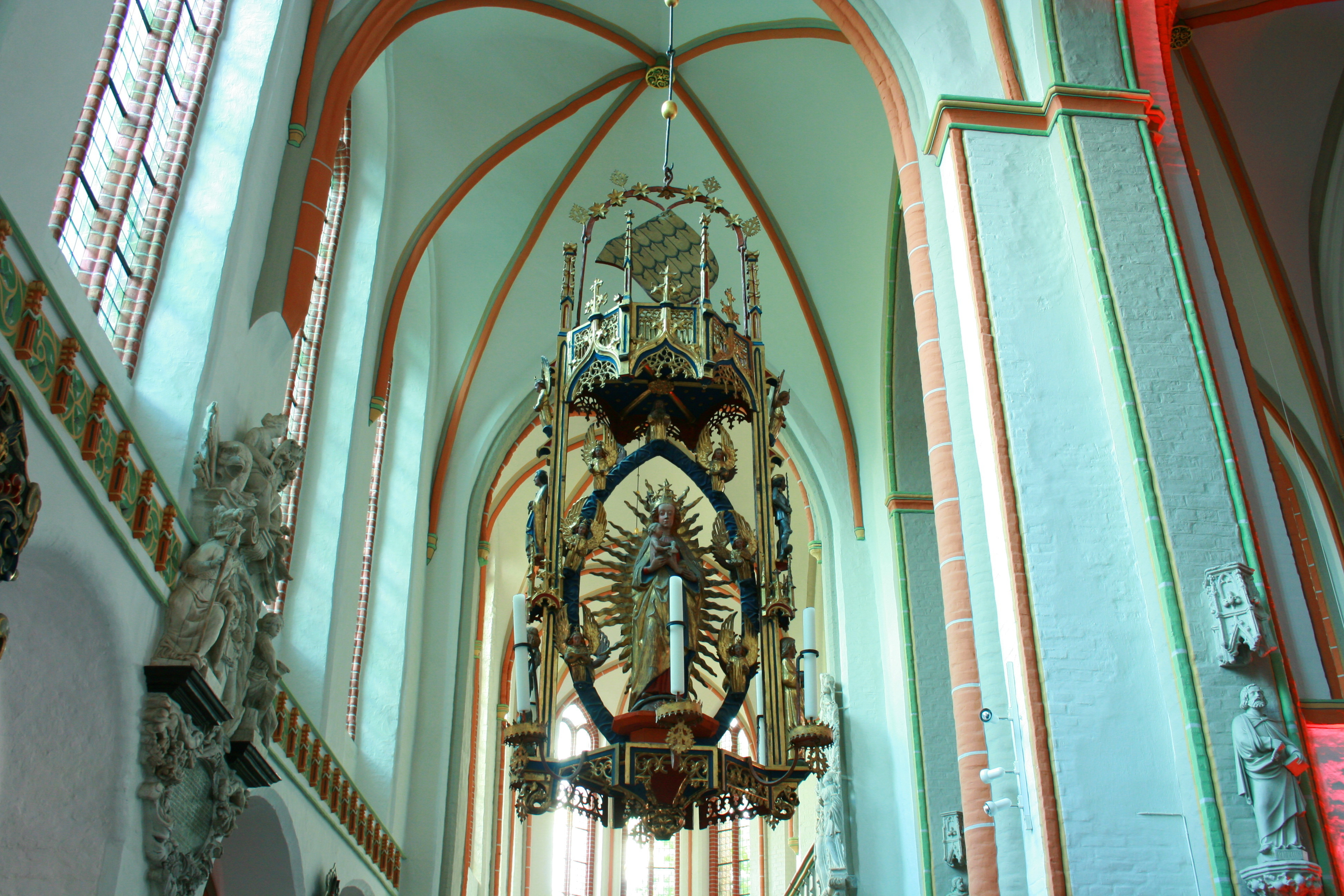 St. Johannis in Lüneburg